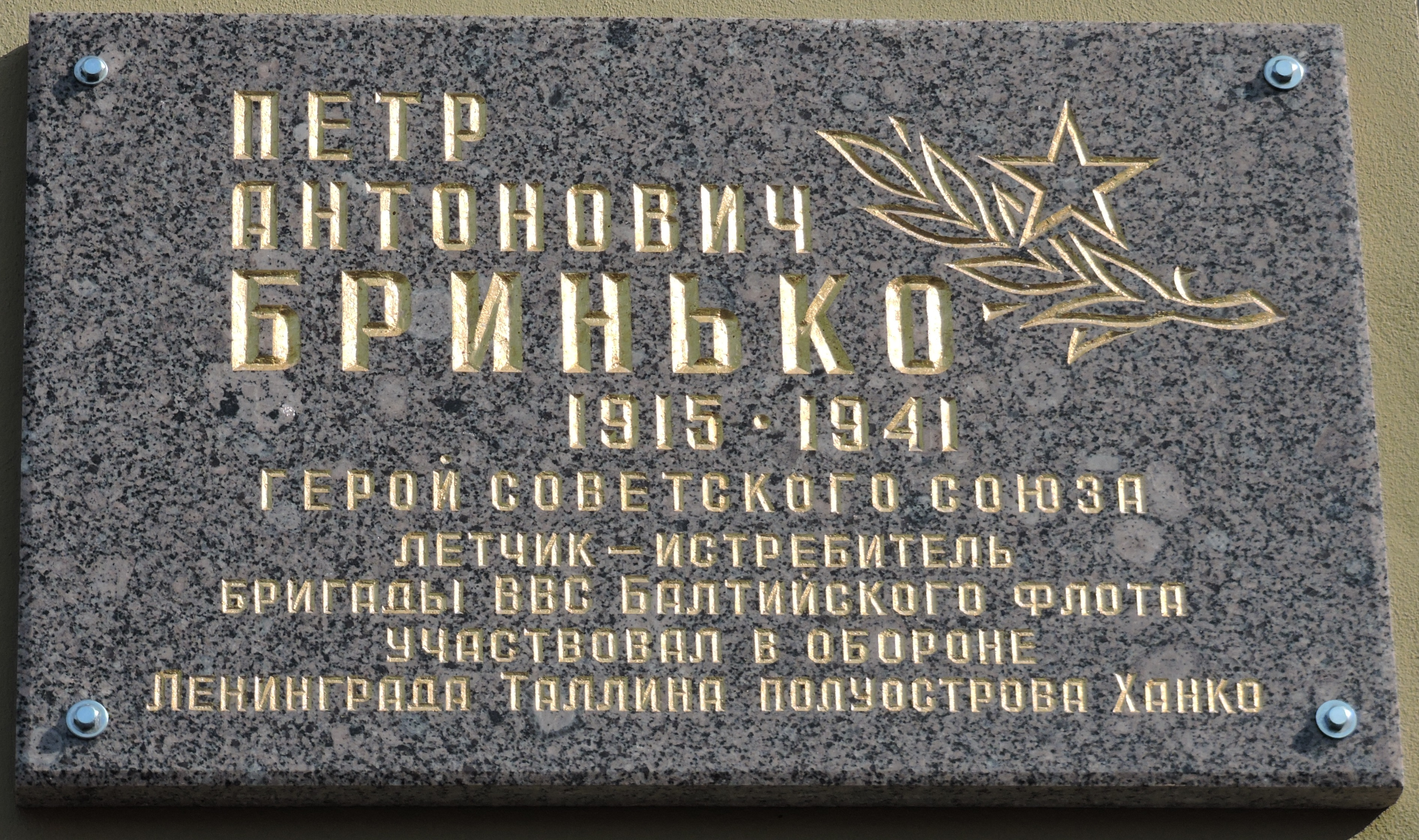 Мемориальная доска Петру Бринько